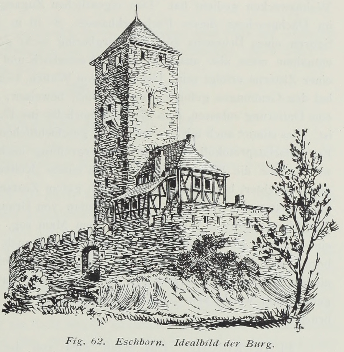 Eschborn Idealbild der Burg